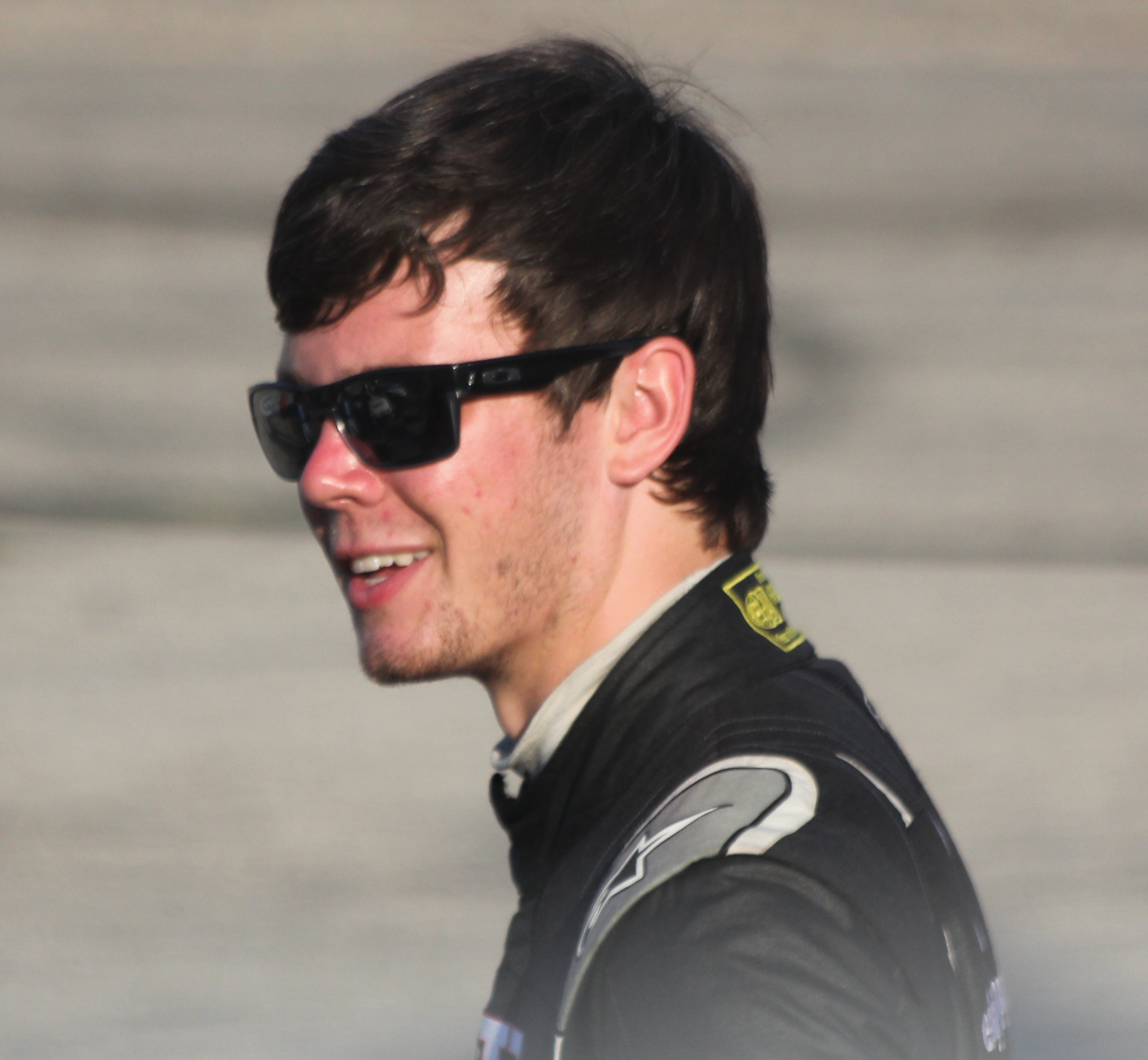 NASCAR driver Erik Jones talking before the 2016 Slinger Nationals.